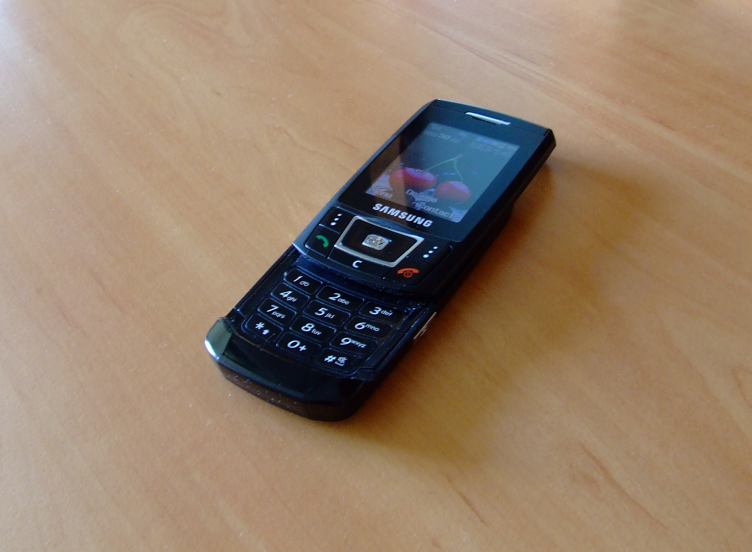 SGH D800